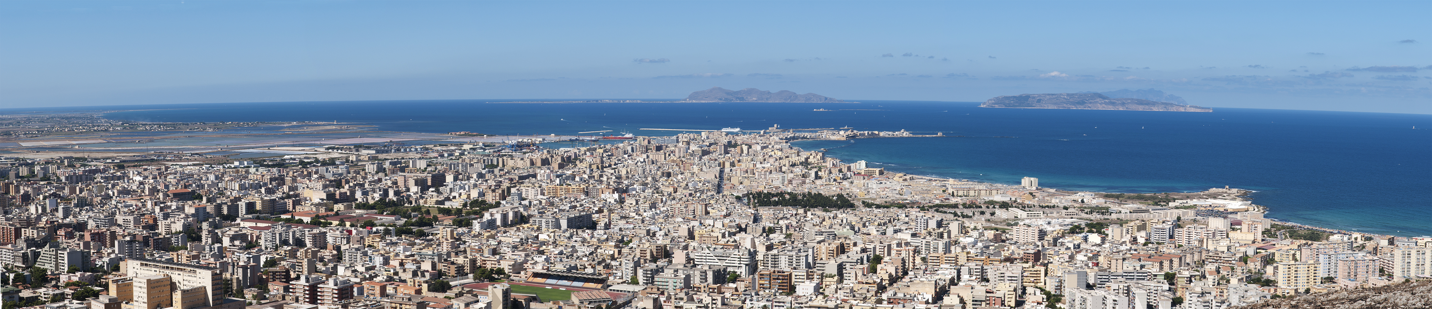 Trapani panorama, Sicily, Italy